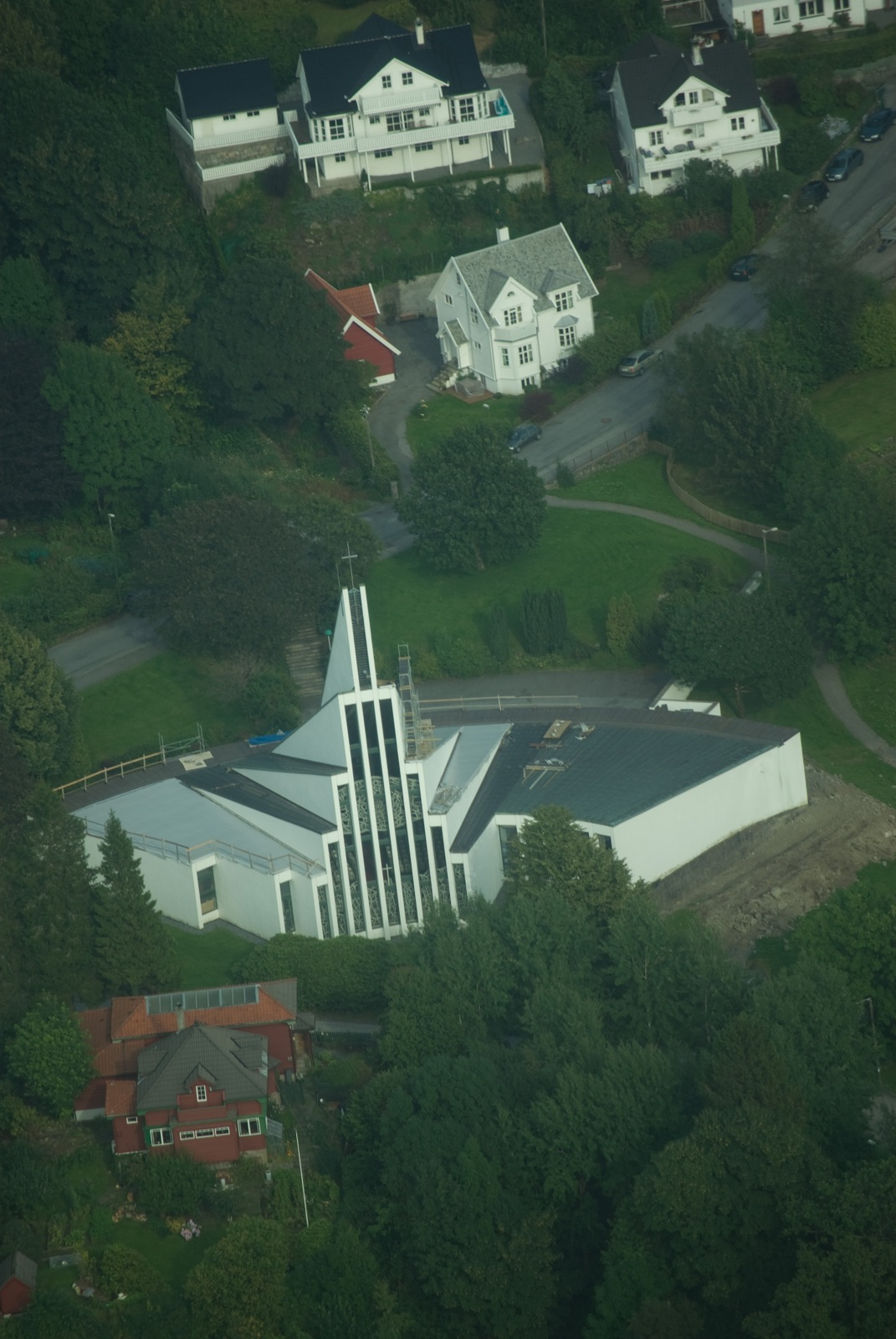 Landås kyrkje i Bergen